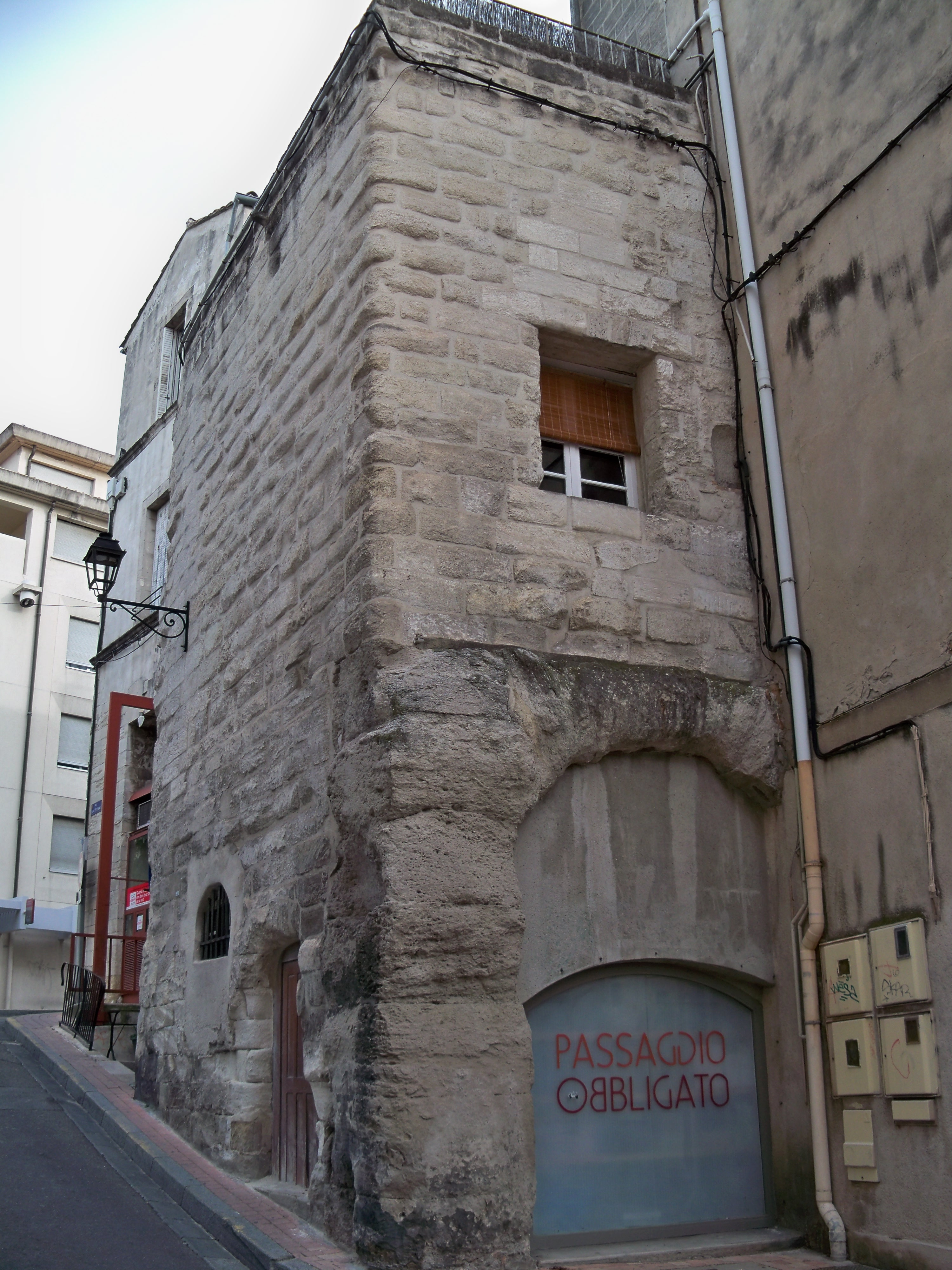 Rue de la petite fusterie à Avignon (84) .